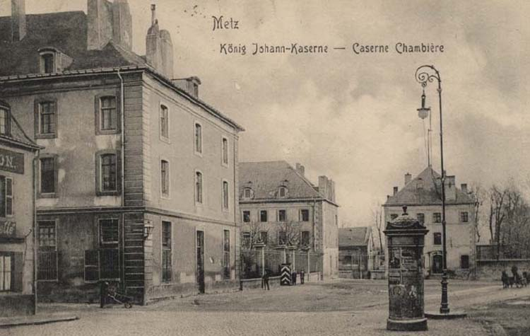 König Johann Kaserne in Metz (franz. Caserne Chambière